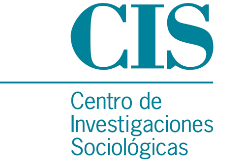 Logotipo del Centro de Investigaciones Sociológicas